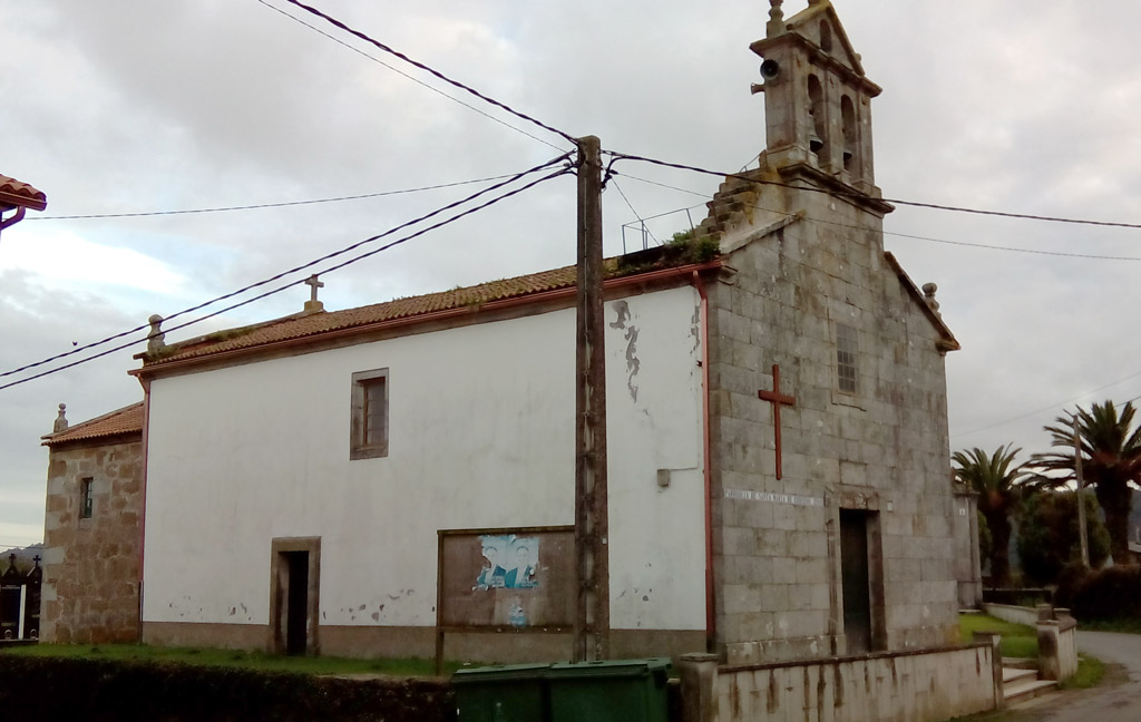 Igrexa de Santa María de Erboedo A Laracha, A Coruña.